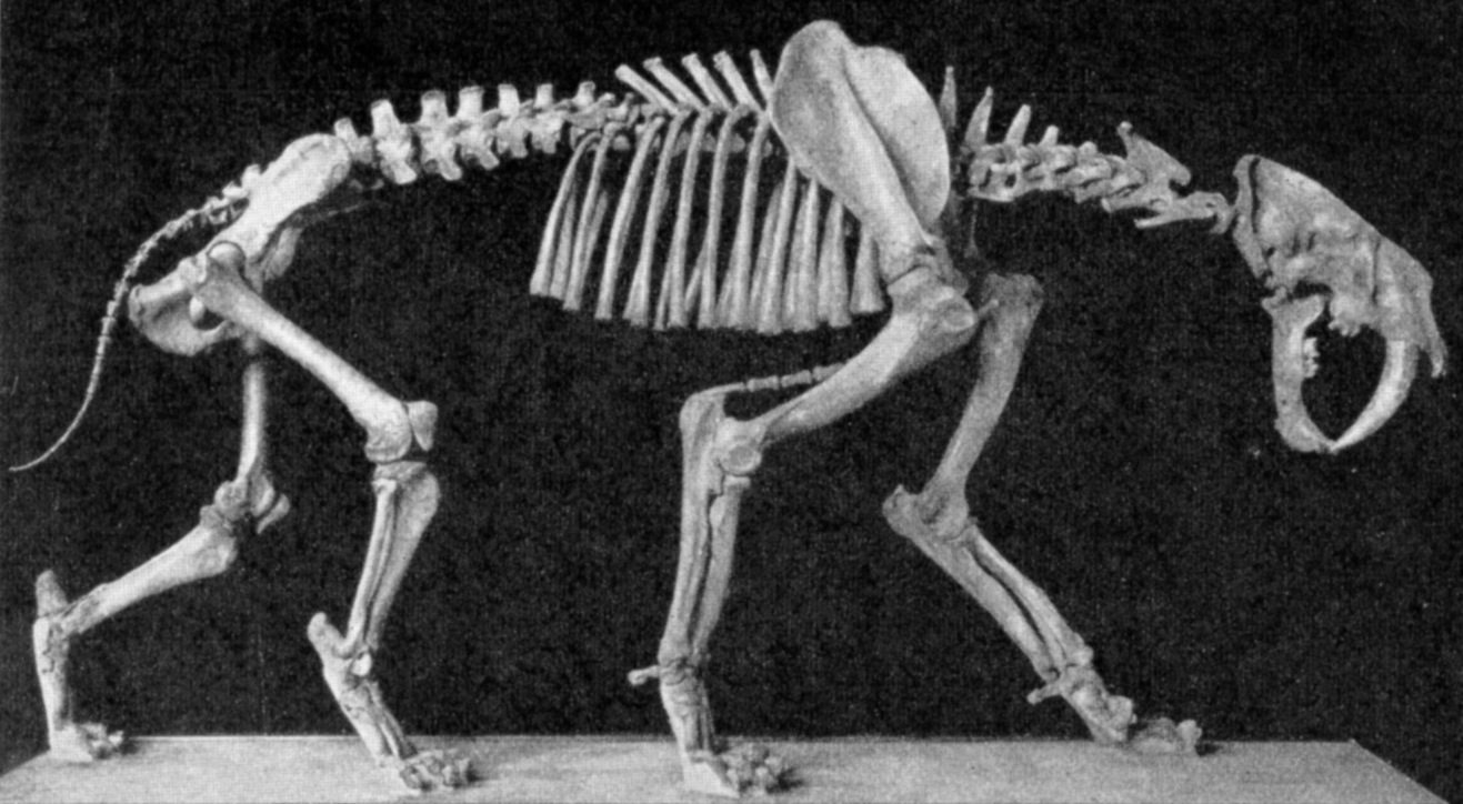 Smilodon populator (formerly neogaeus) skeleton.